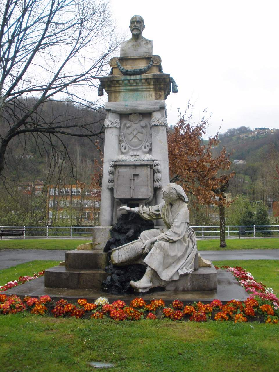 Monumento a Luis Adaro y Magro en Sama de Langreo (Asturias)